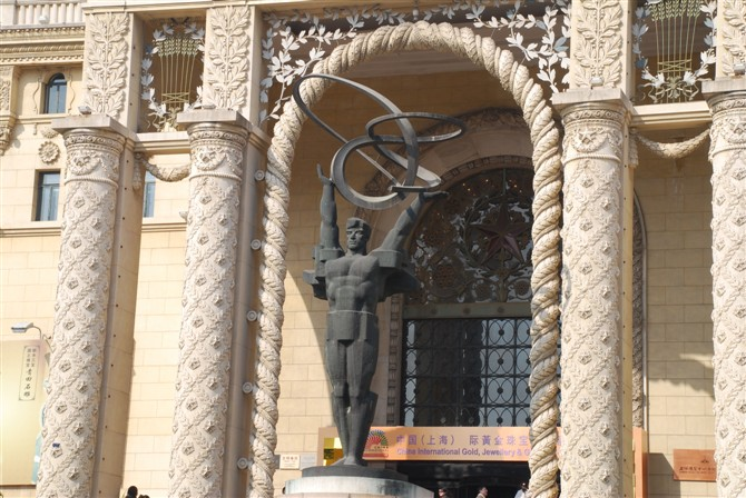 上海展览馆